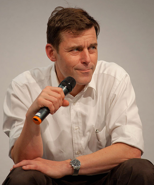 Peter Stamm, au Salon du livre de Genève, en 2012.